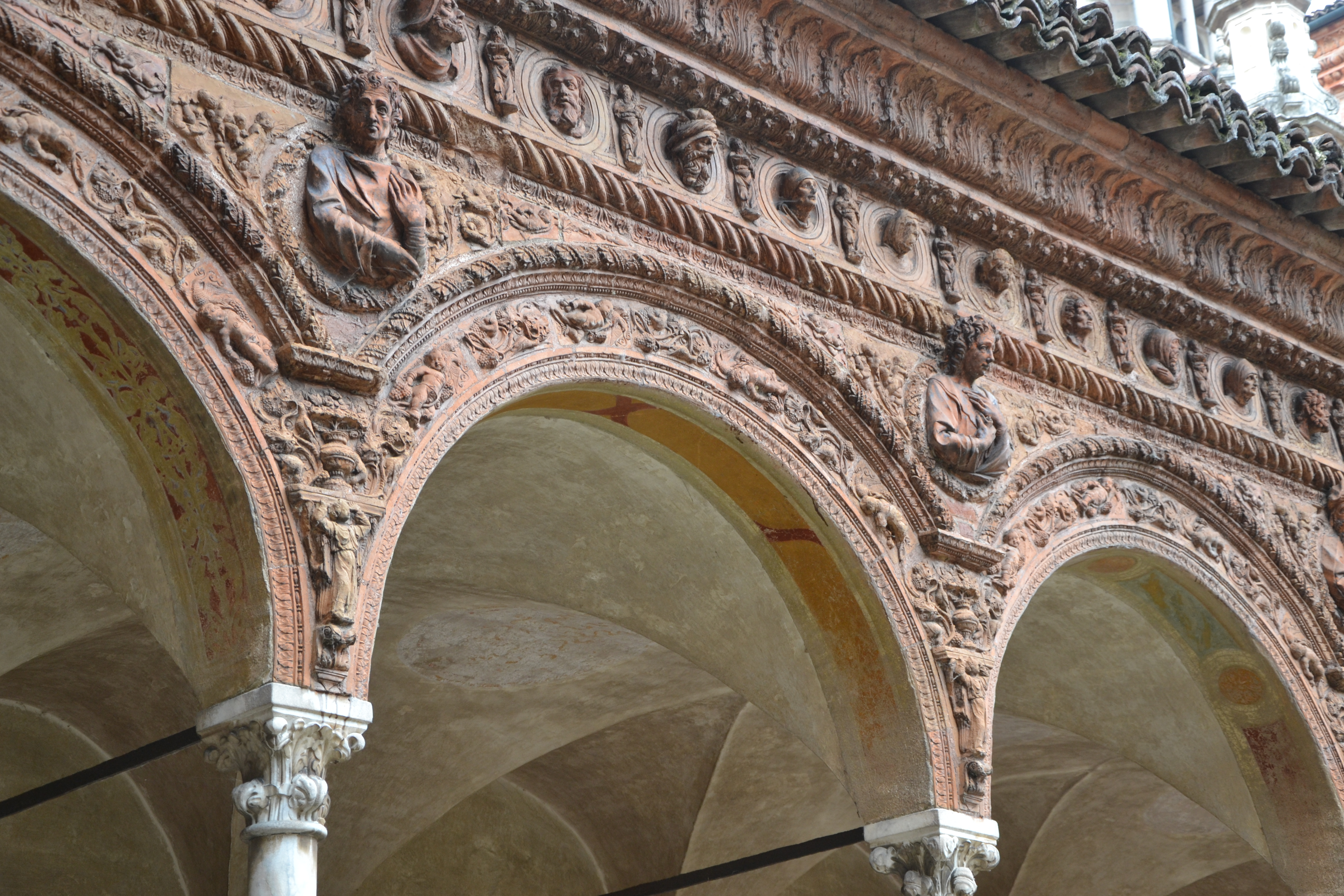 Certosa di Pavia